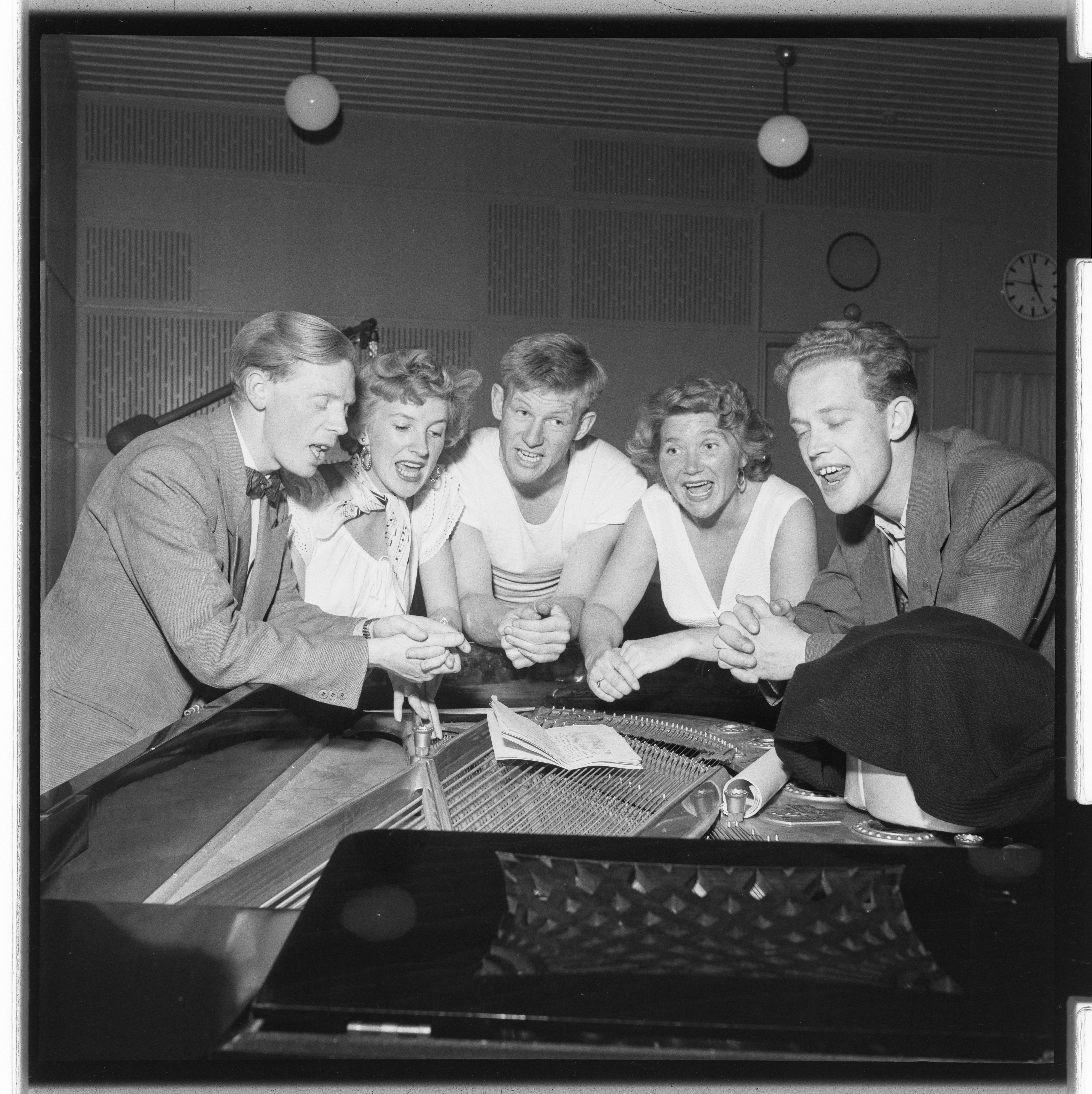 Bildet er hentet fra Arkivverket. The Monnkeys. NÅ nr. 18, 1954 Arkivinstitusjon : Riksarkivet Arkivnavn : Billedbladet NÅ Sted : Norge, Ukjent, Ukjent, Ukjent Emneord: Musikkgrupper, Band Avbildet